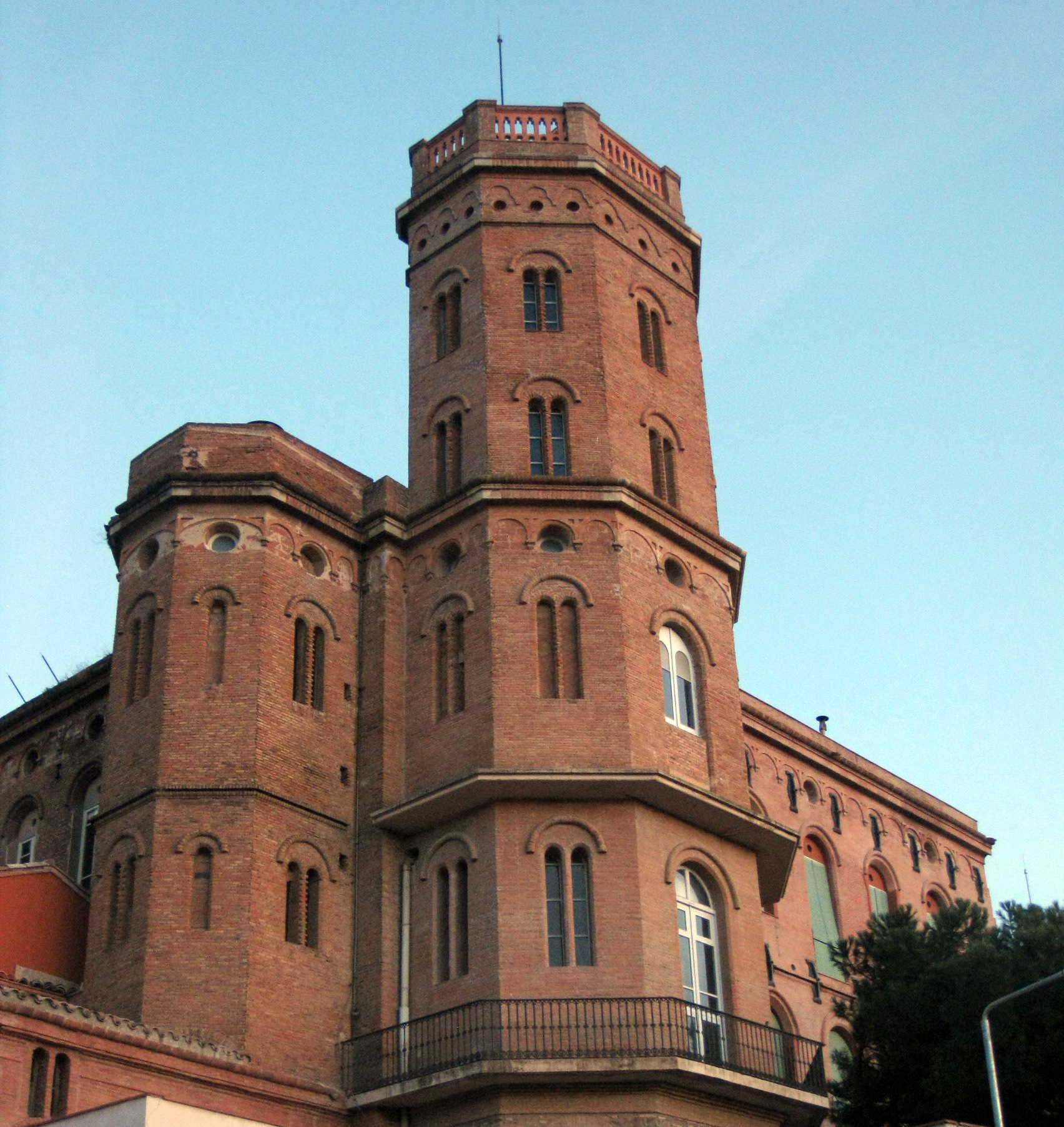 Escoles Pies, més conegut com «els Escolapis», situat al carrer del Col·legi núm. 10-16 (Terrassa). Edifici historicista de mitjan segle XIX. Vista de la façana posterior, amb la torre de cinc plantes.